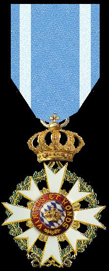 Scan van een kruisje in mijn verzameling Robert Prummel